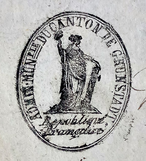 Stempelabdruck Kanton Grünstadt, 1804 (von altem Dokument im Museum Grünstadt)